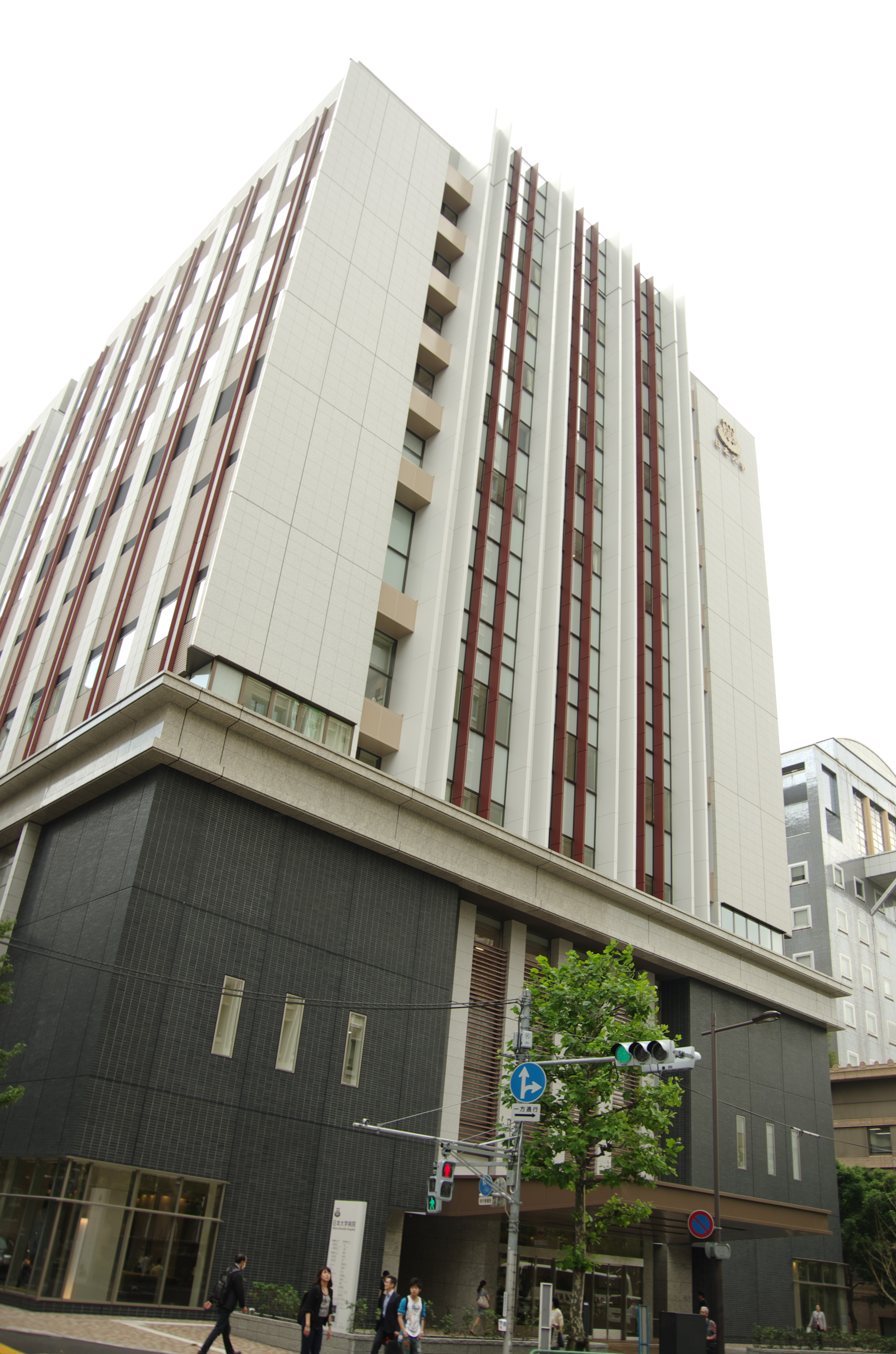 2014年10月1日に新築移転した日本大学病院（旧名称：駿河台日本大学病院）